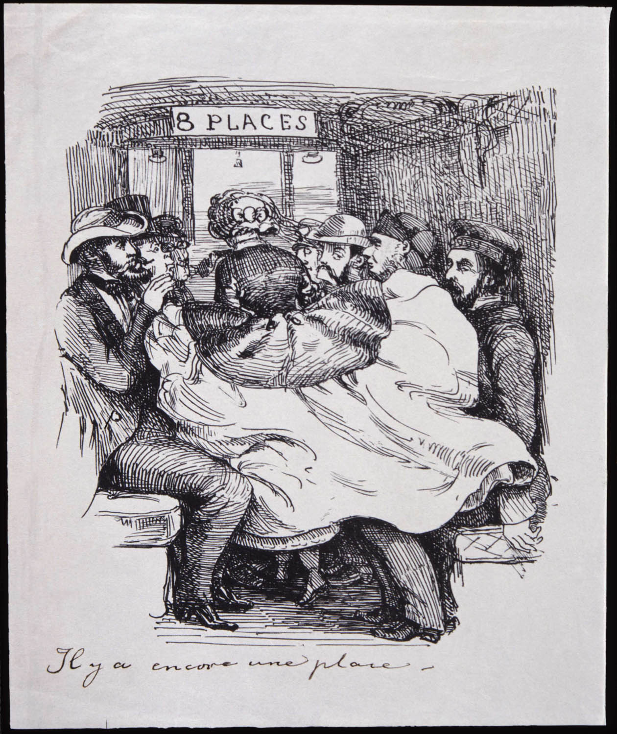 "Il y a encore une place". Resande i en tågkupé. Tusch av Fritz von Dardel